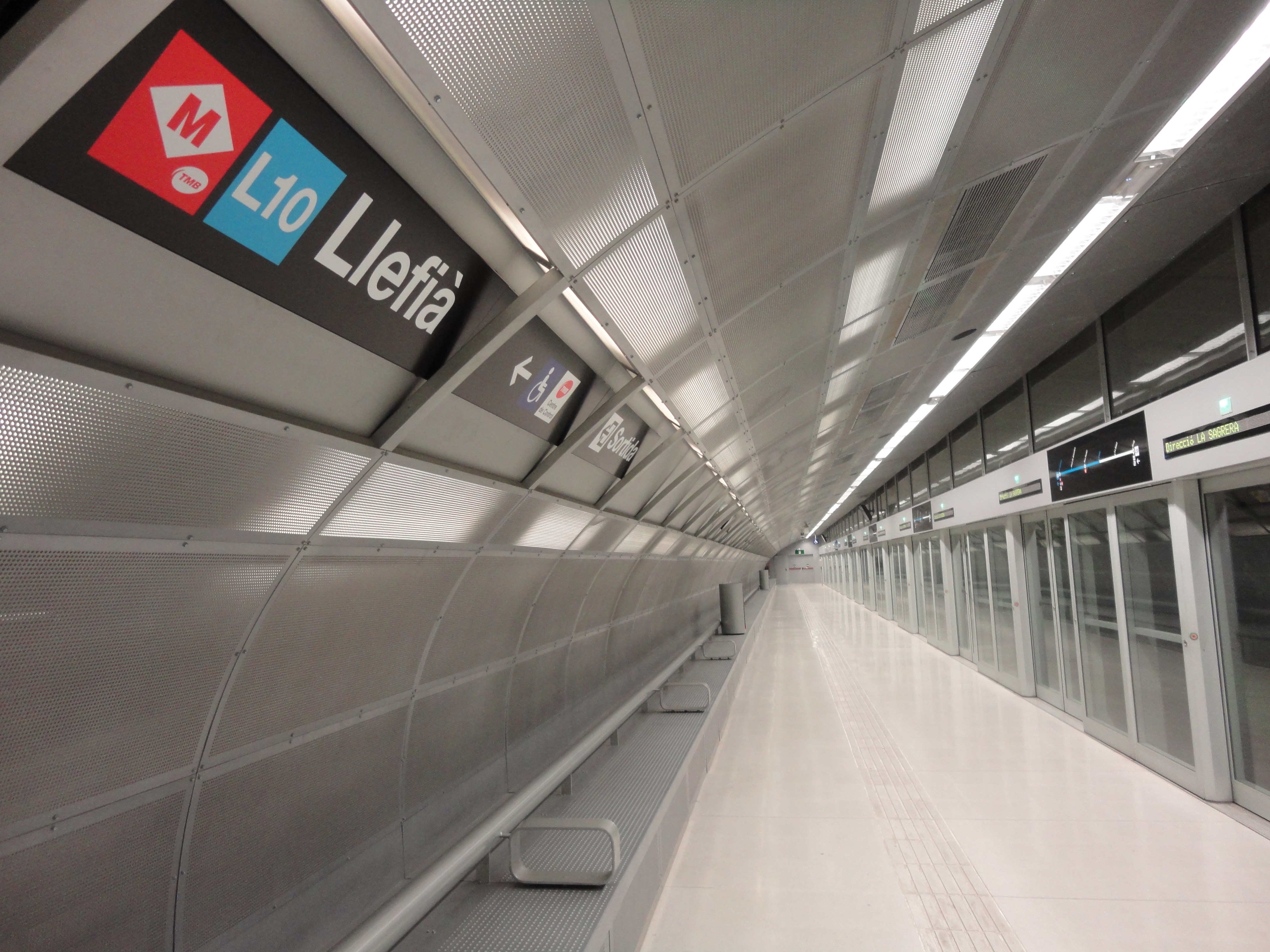 Estació de llefià